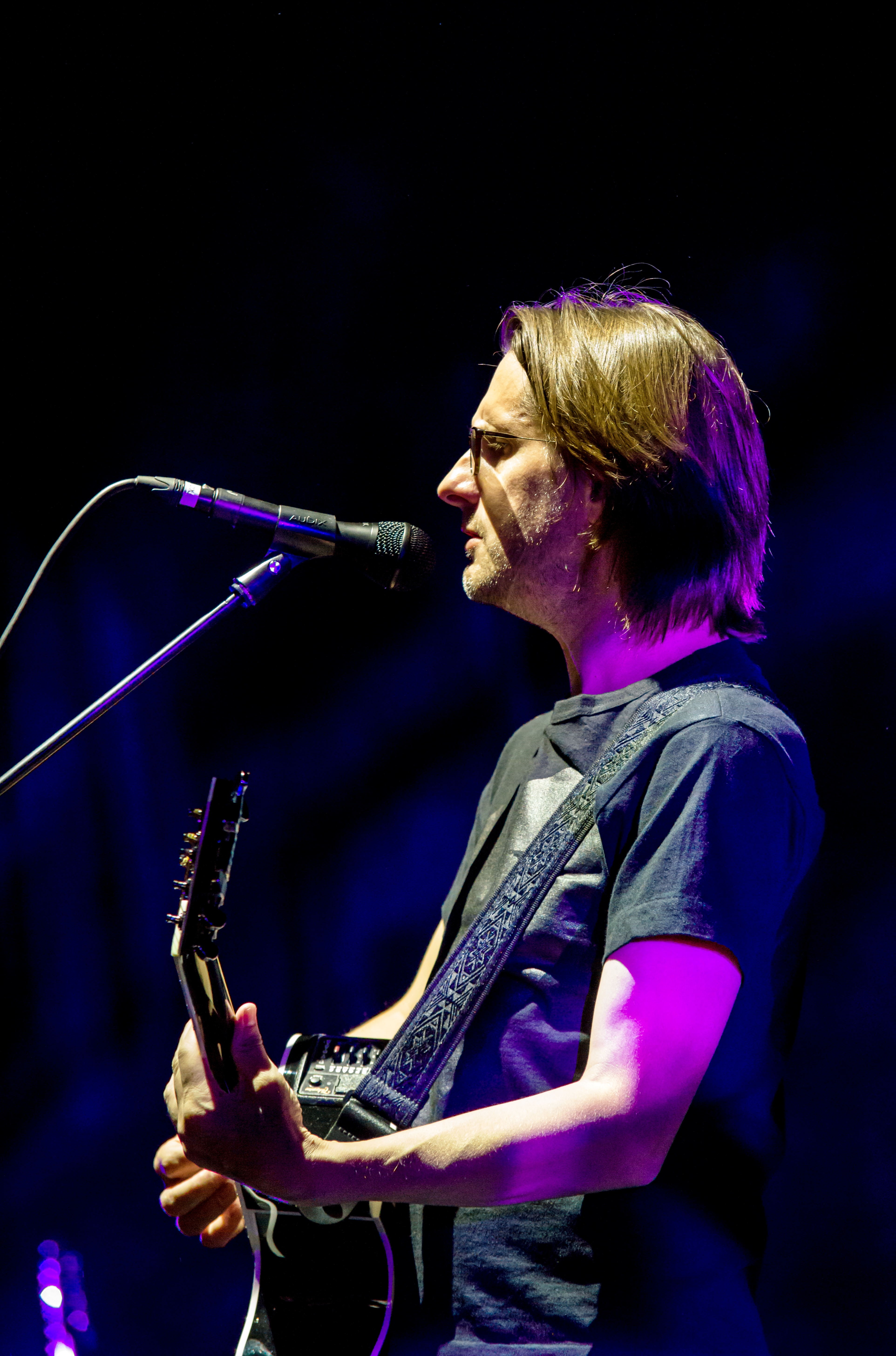 Bilder vom Zelt Musik Festival 2018 in Freiburg im Breisgau Das Eröffnungskonzert mit Steven Wilson